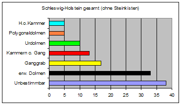 Schleswig-Holstein Megalithen